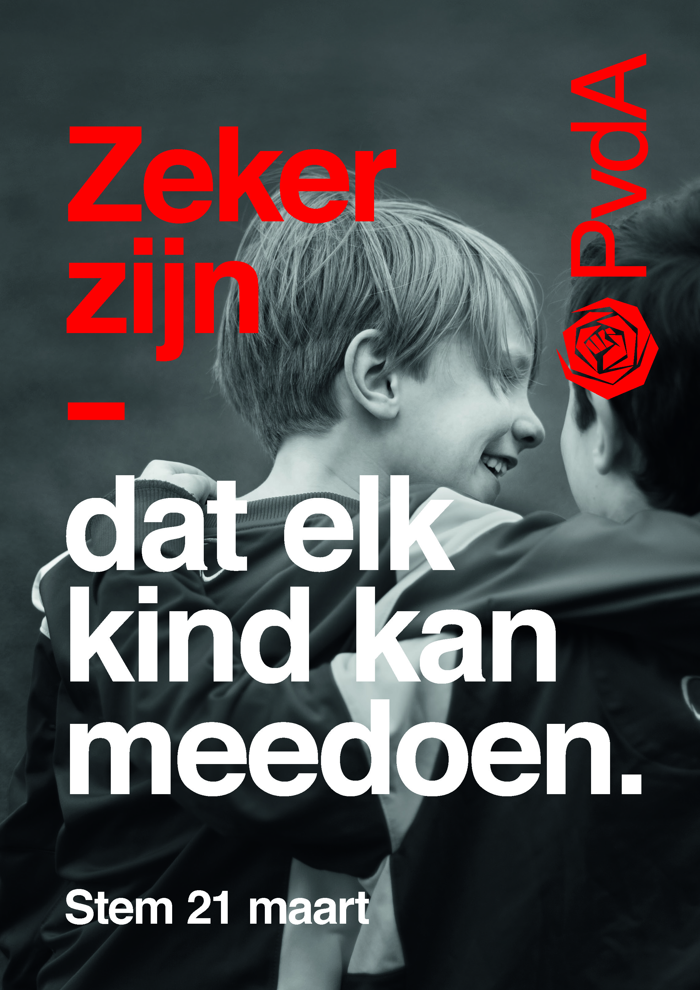 Posters met beeld_staand A3_2e batch_Deel10